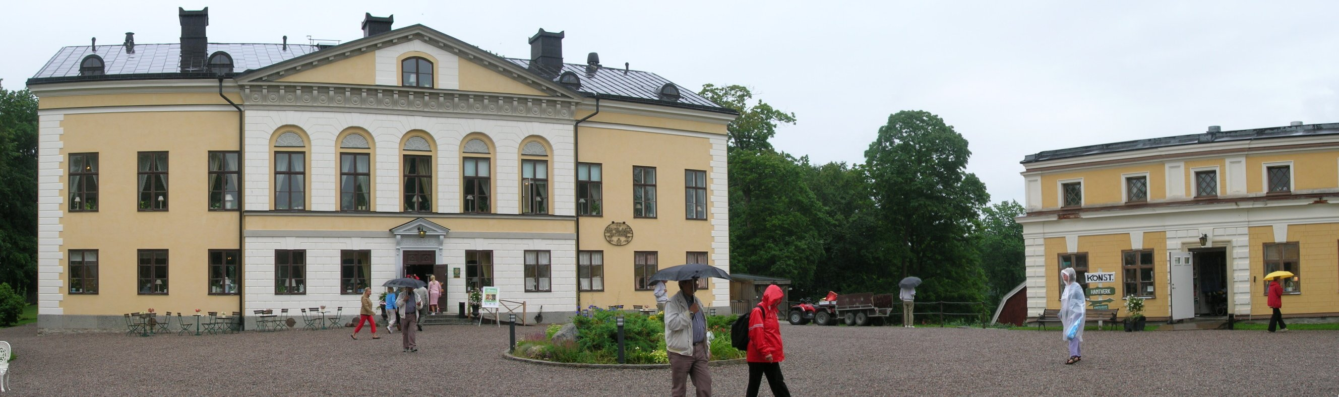 Taxinge-Näsy slott, Taxinge, Nykvarns kommun, Sverige